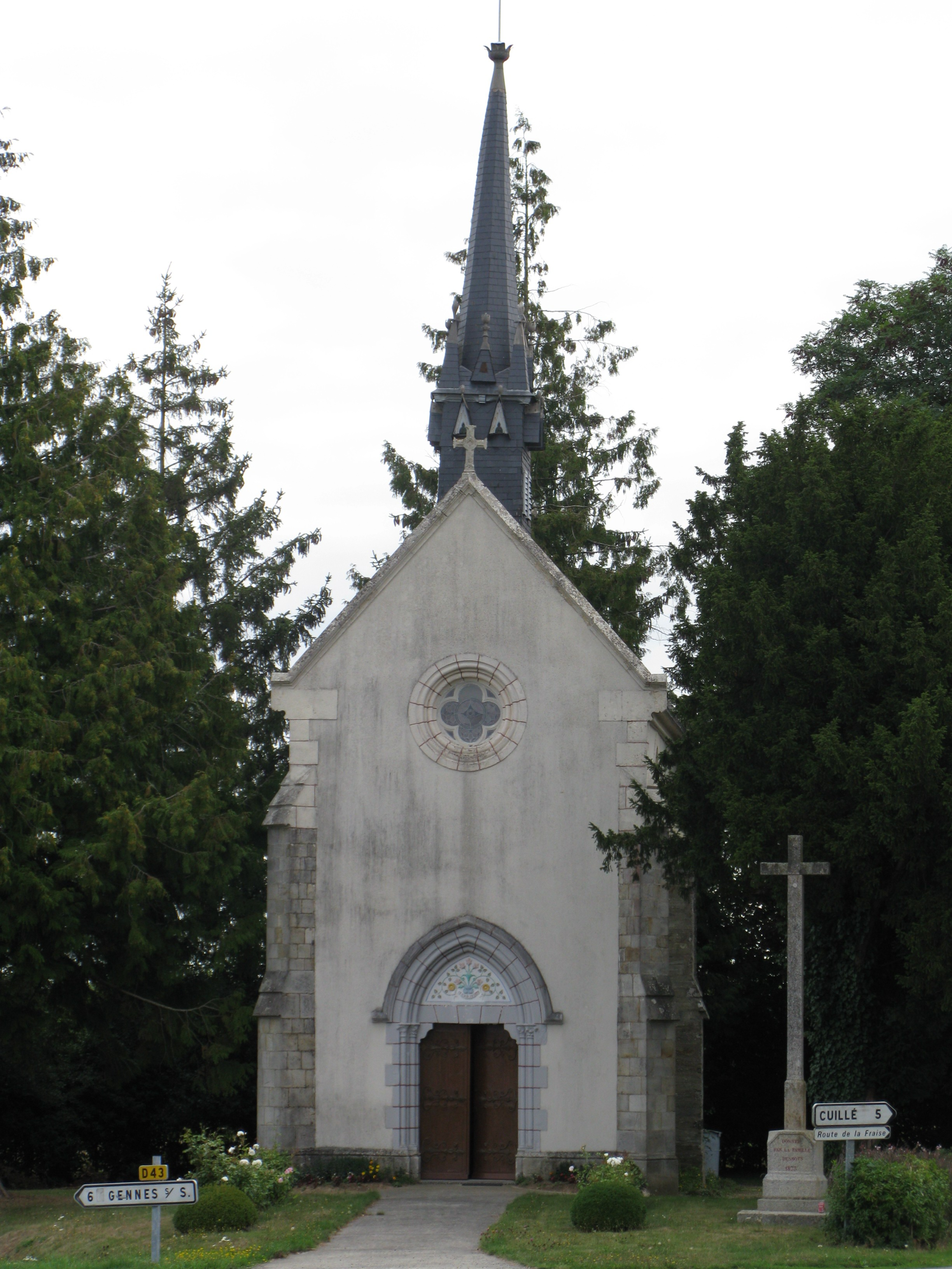 Chapelle Saint-Joseph à Availles-sur-Seiche